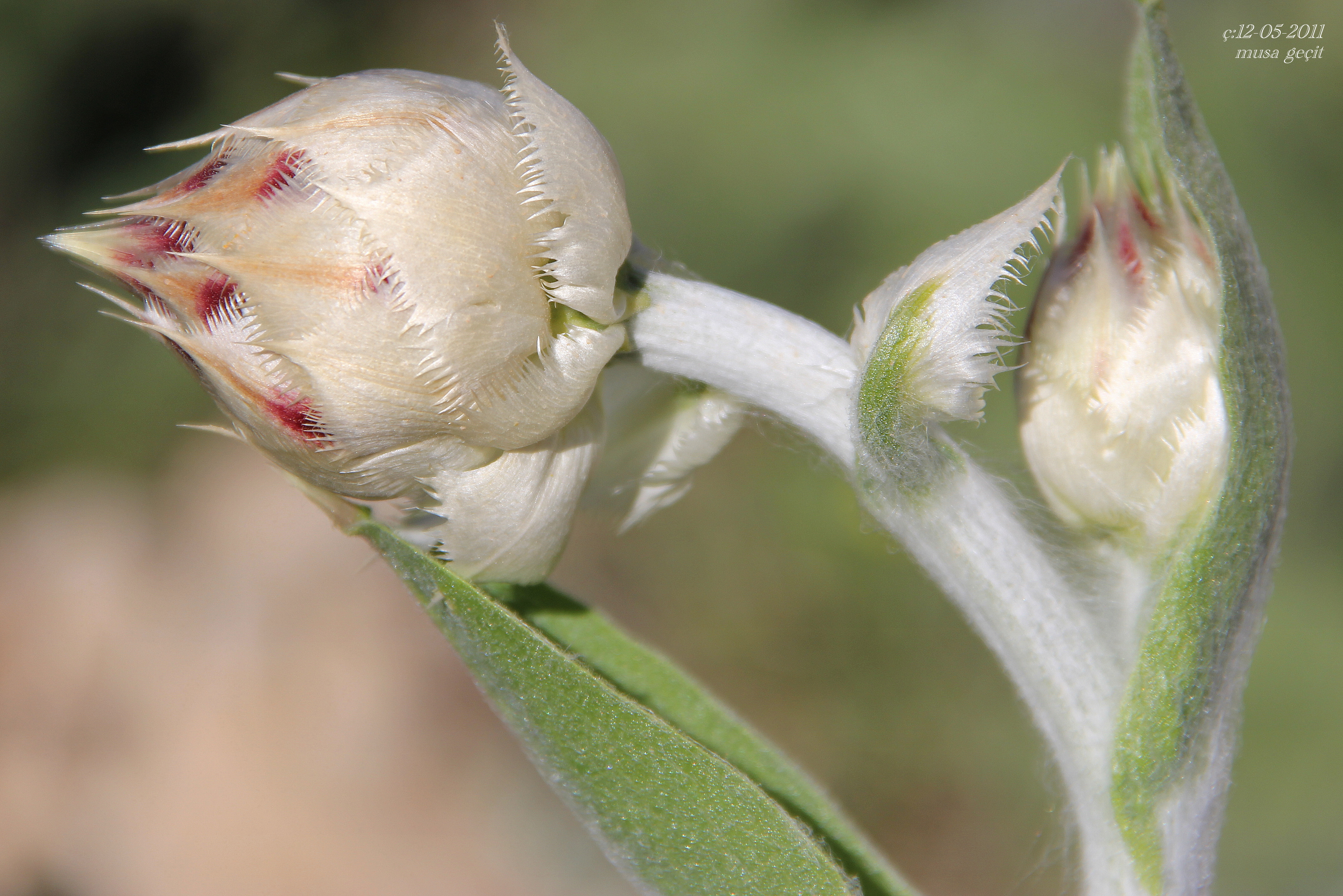 Yer: Mardin Centaurea regia subsp. cynarocephala (Wagenitz) Preferred Centaurea cynarocephala Wagenitz Synonym